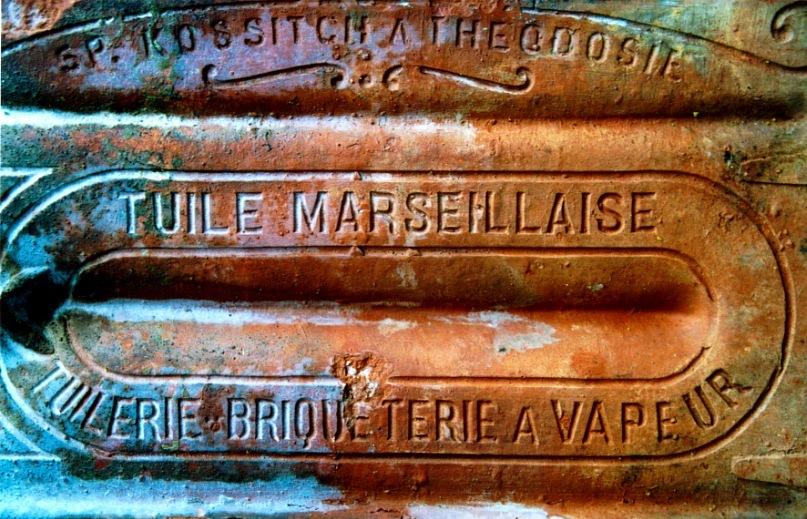 Надпись по-французски: Сп(иридон) Коссич и Феодосия Черепица марсельская Паровая черепично-кирпичная (фабрика)